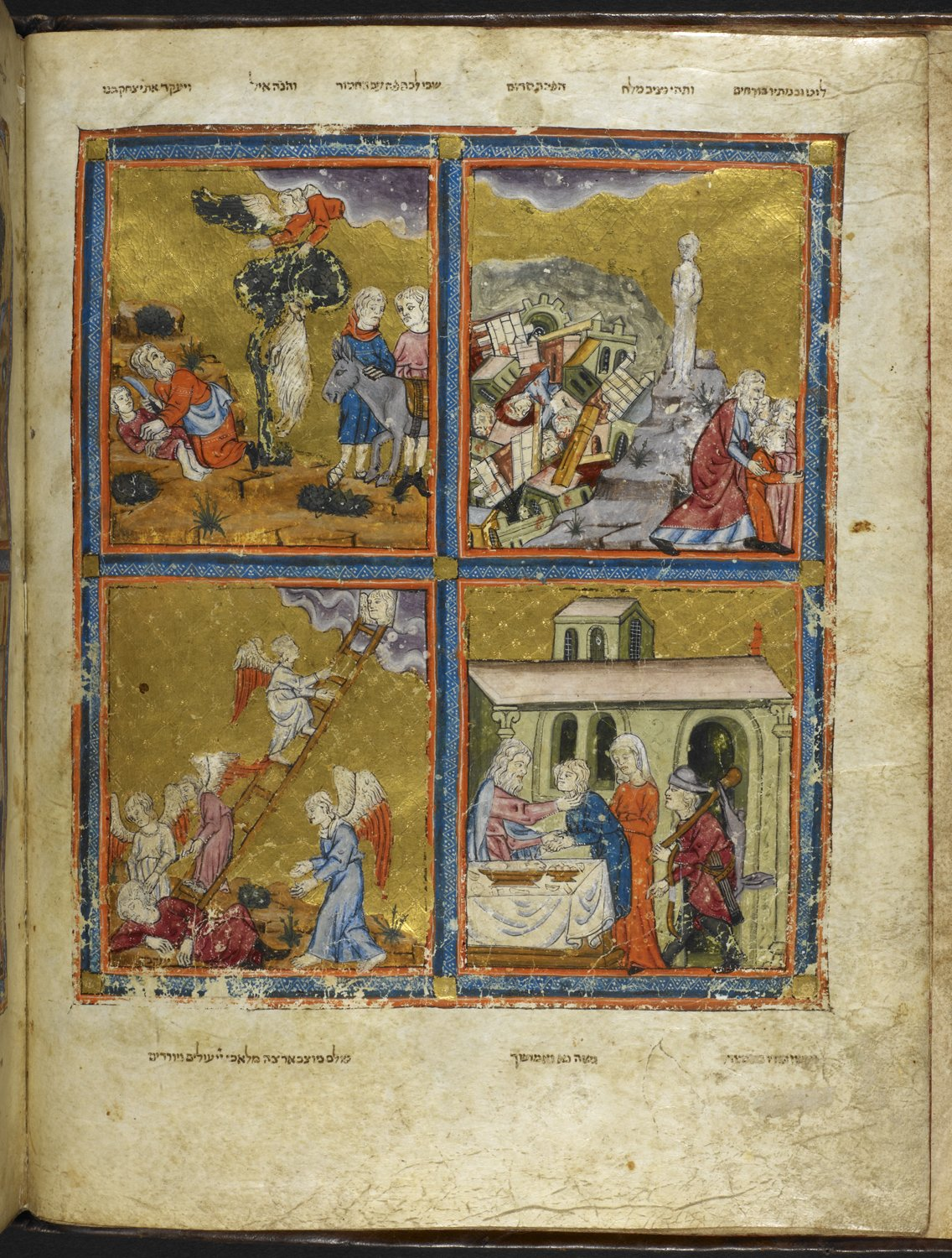 Enluminures de Haggadot Sefarade du 14° Siècle, fol. 4v